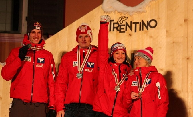 Gregor Schlierenzauer, Thomas Morgenstern, Chiara Hoelzl i Jacqueline Seifriedsberger podczas dekoracji medalistów konkursu drużyn mieszanych na skoczni normalnej (Mistrzostwa Świata 2013, Val di Fiemme).